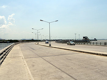 ถนนเลียบชายทะเล เมืองชลบุรี